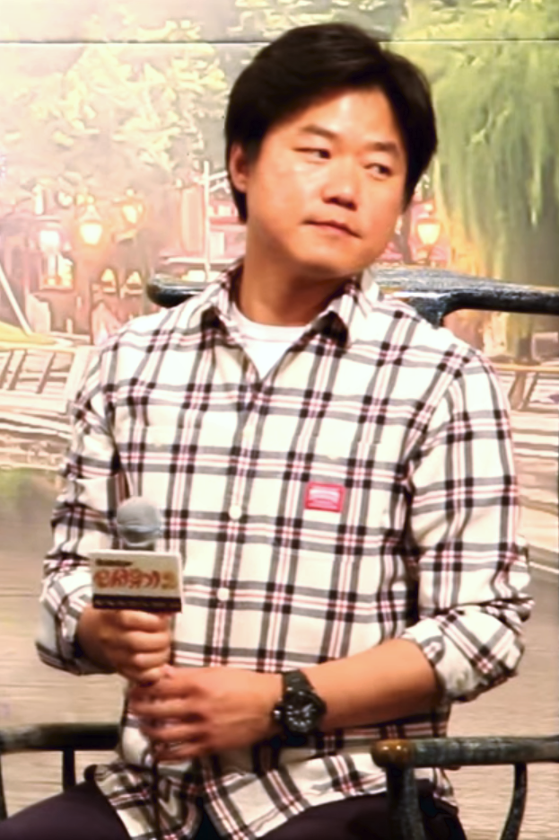 tvN go '신서유기2' 제작발표회